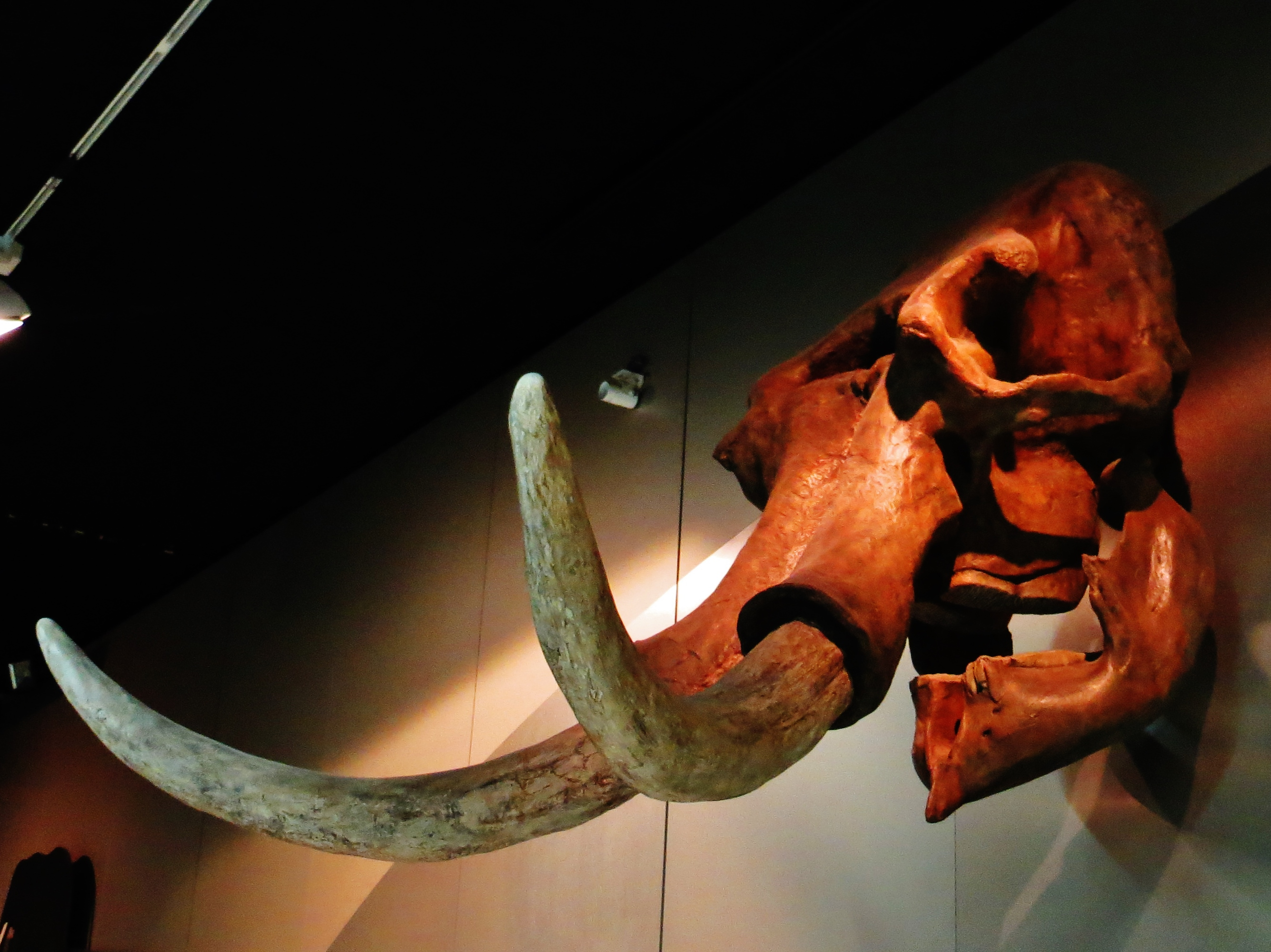 Took the picture at Senckenberg Museum, Frankfurt